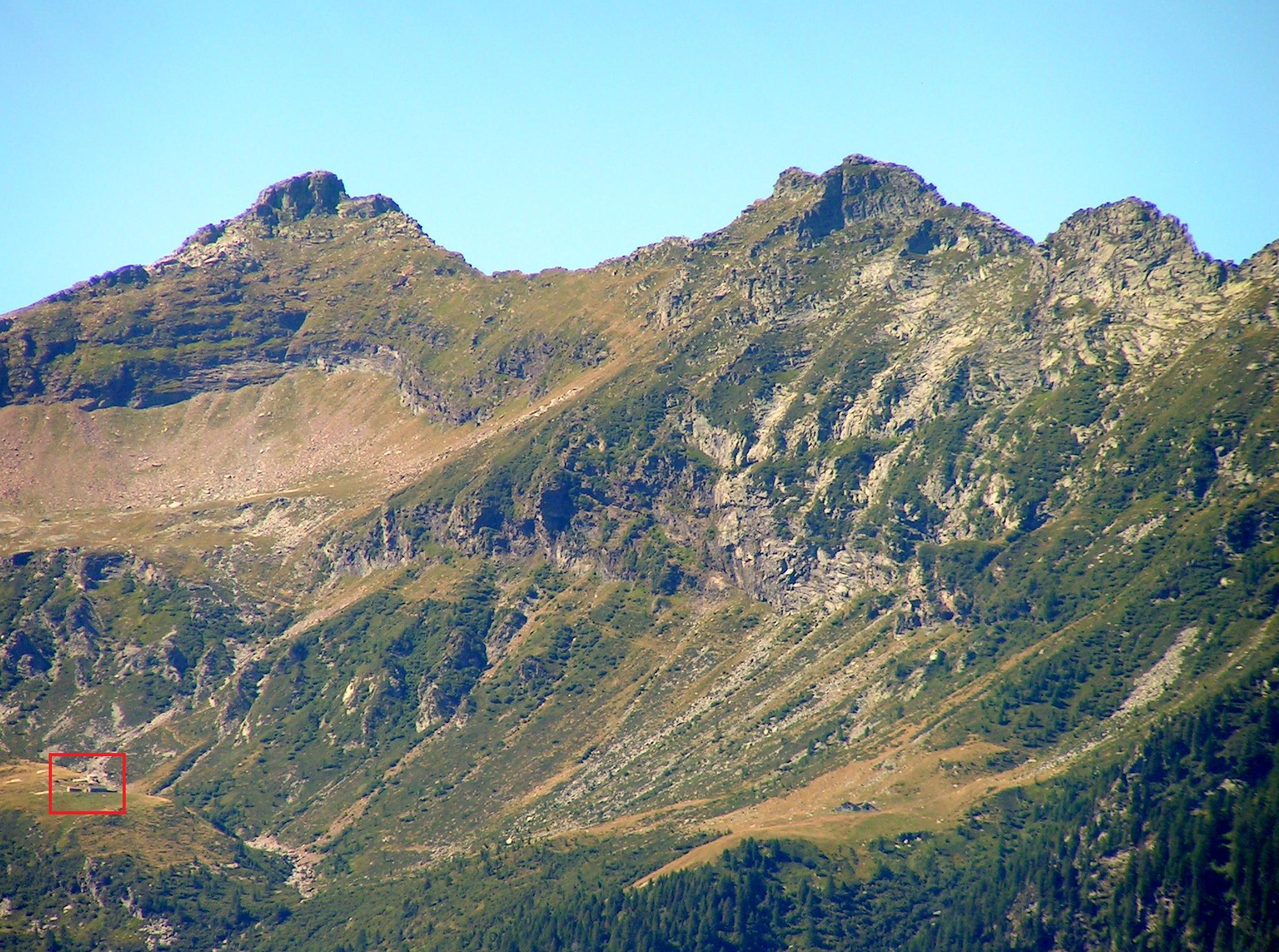 Le refuge Moroscietto en bas à gauche